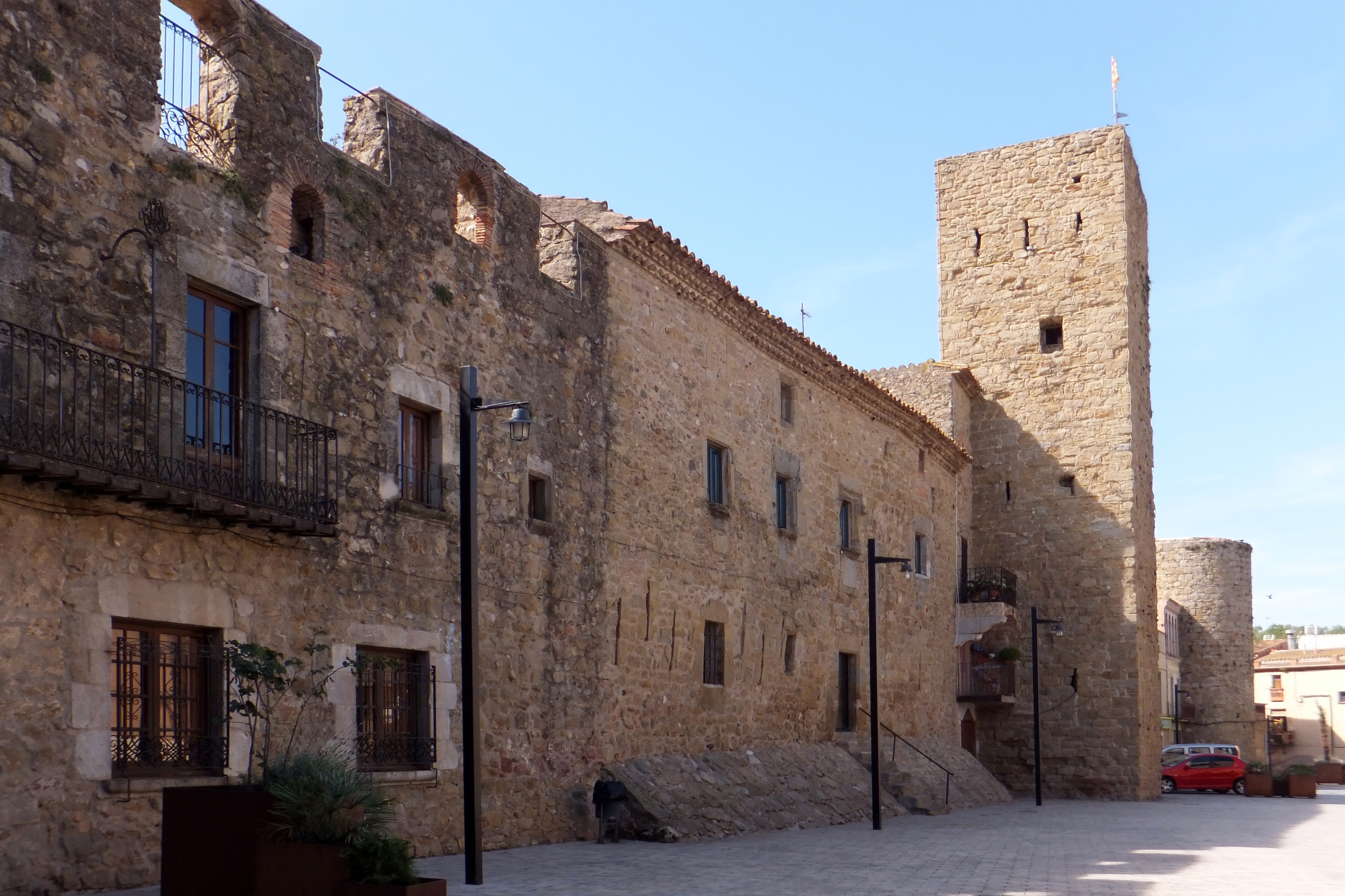 Castell de Verges